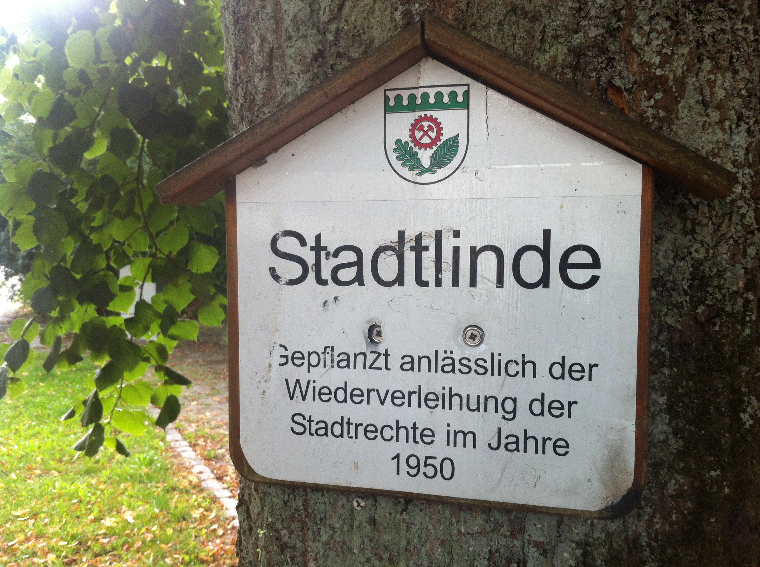 Blumberg, Stadt im Schwarzwald-Baar-Kreis. Öffentliche Tafel zur Erinnerung an die Wiederverleihung des Stadtrechts 1950 an der Stadtlinde in Blumberg.